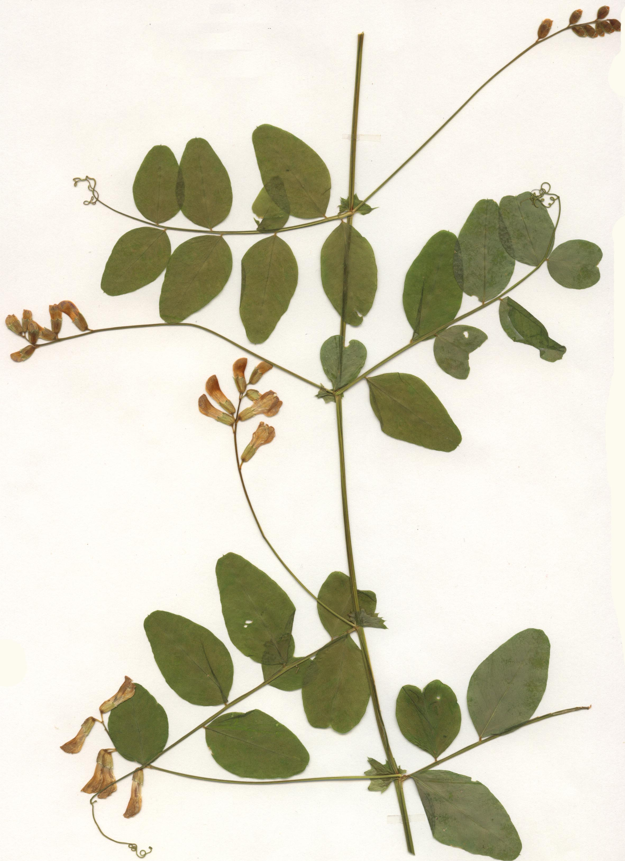 Vicia dumetorum, eigener Herbarbeleg